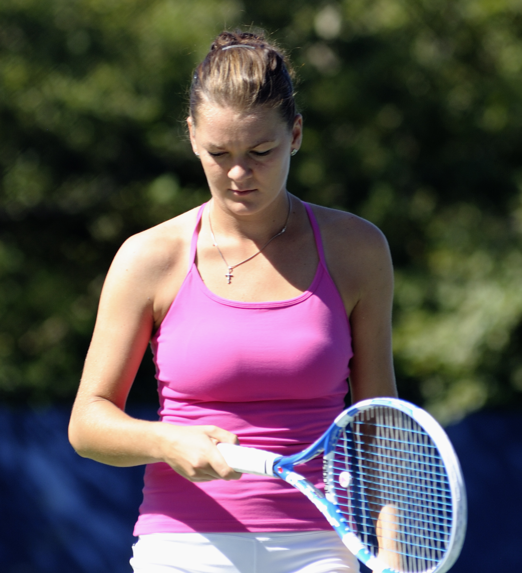 Pensive Agnieszka Radwańska at 2011 US Open